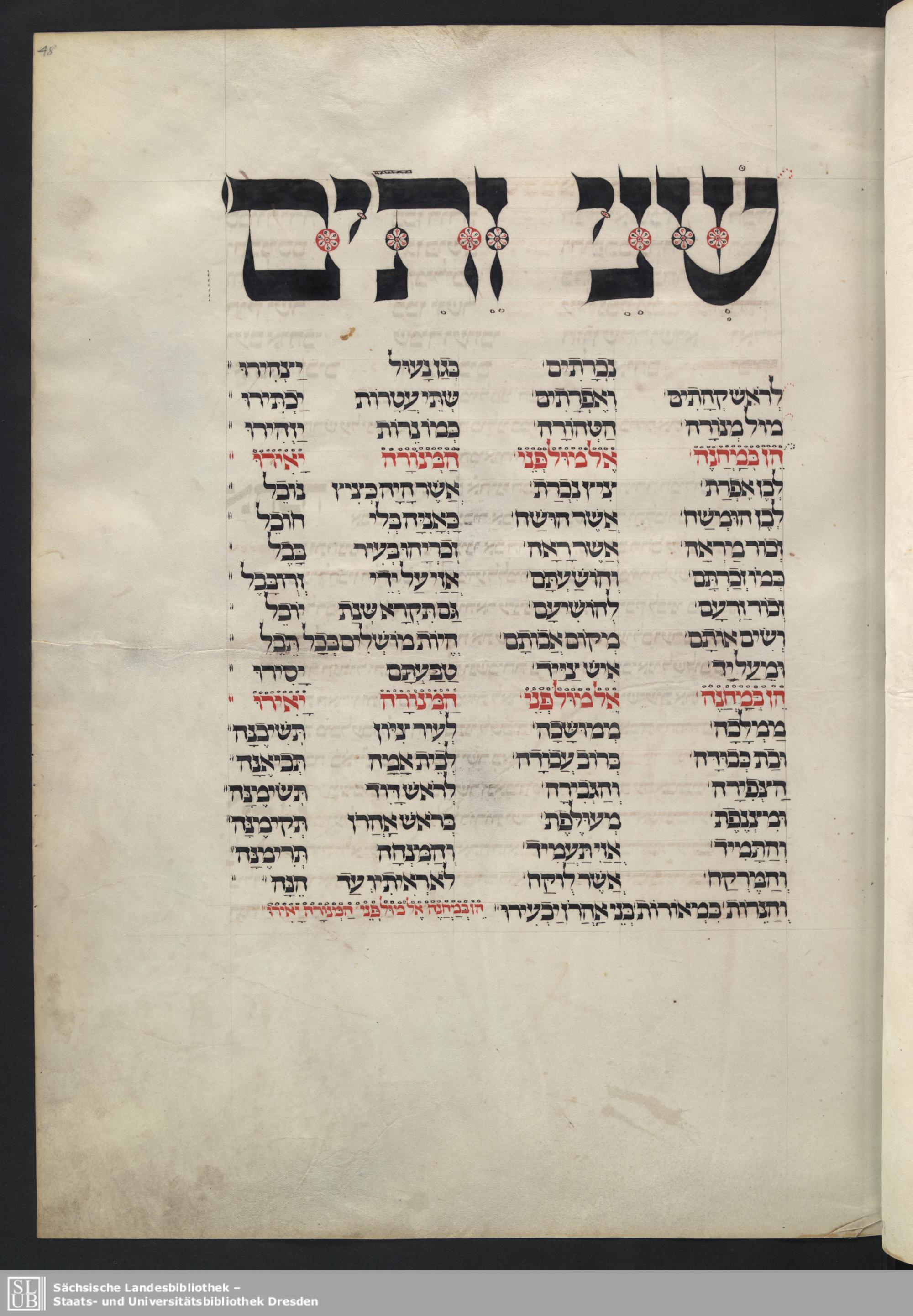 הפיוט שני זיתים לשבת חנוכה, מאת רבי שלמה אבן גבירול, מתוך מחזור אשכנז כת"י דרזדן A.46.a עמוד 48א